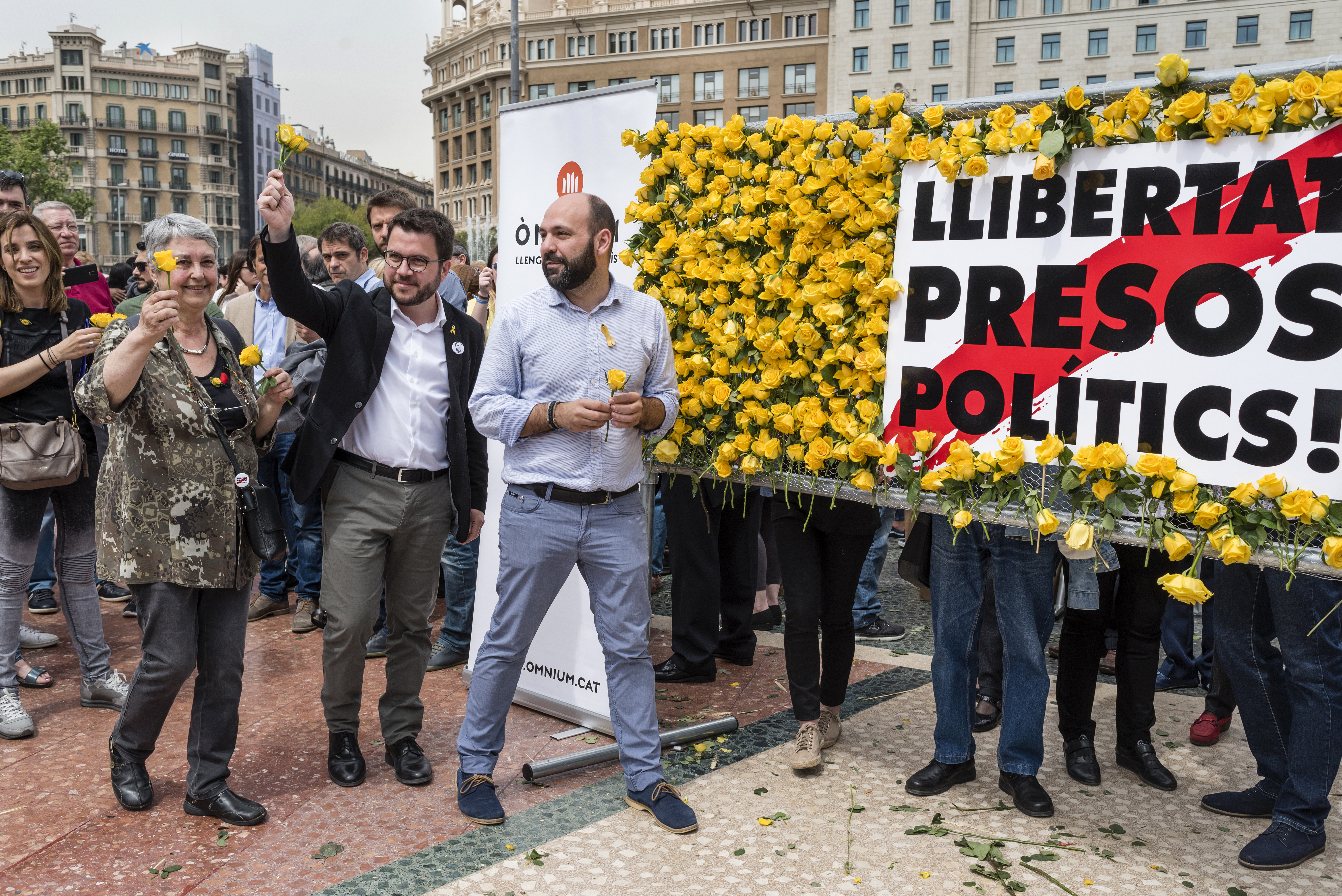 _DC74869